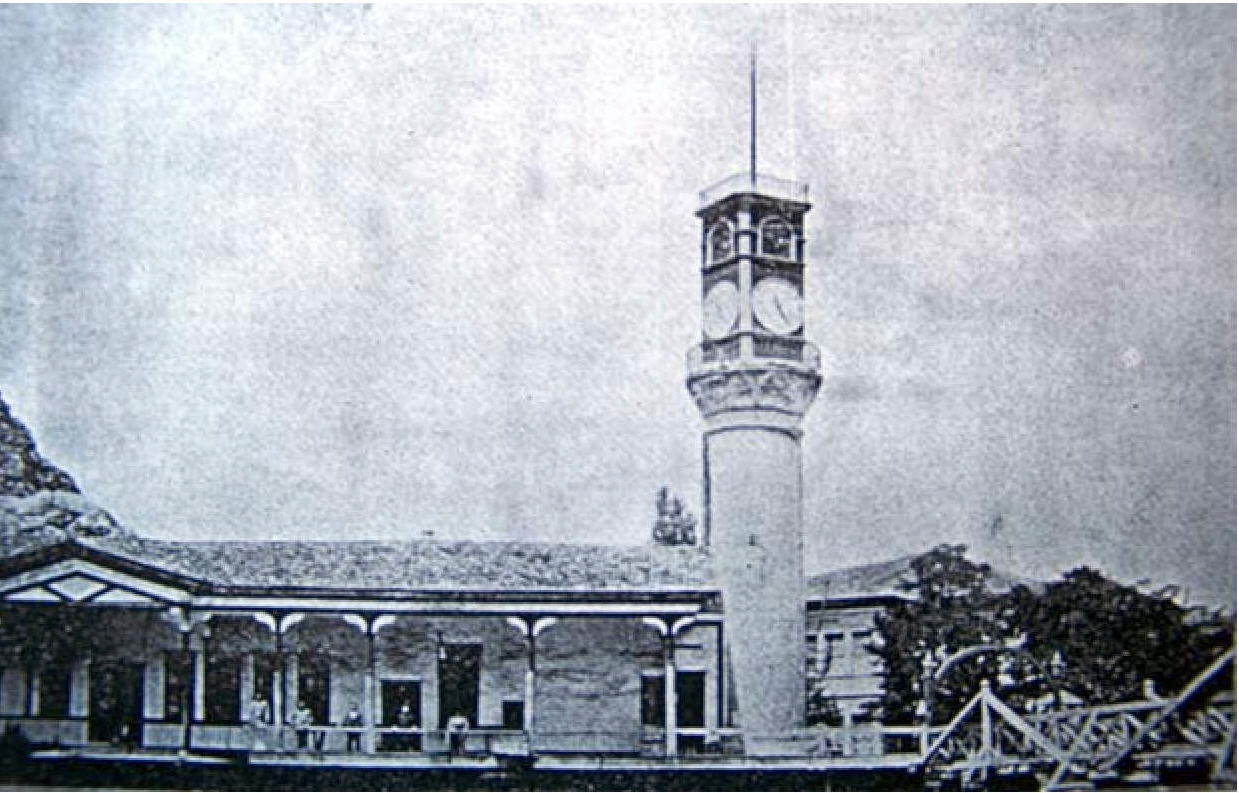 Amasya Saat Kulesi'nin 1903 yılına ait Sivas Vilayeti Salnamesi'nde yer alan bir fotoğrafı.